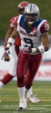 Anwar Stewart.